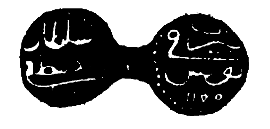 Monnaie tunisienne en 1761 : le nasry